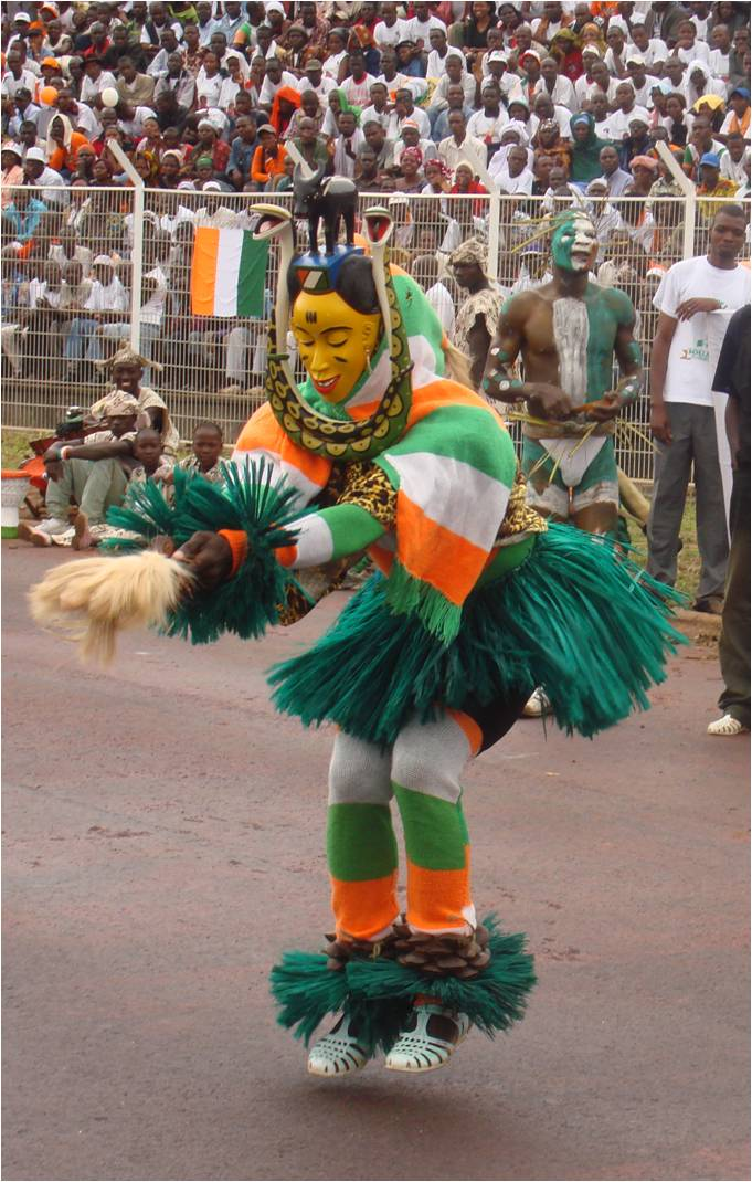 Danse traditionnelle du centre-ouest de la Côte d'Ivoire (Zaouli) à la cérémonie de la flamme de la paix à Bouaké.